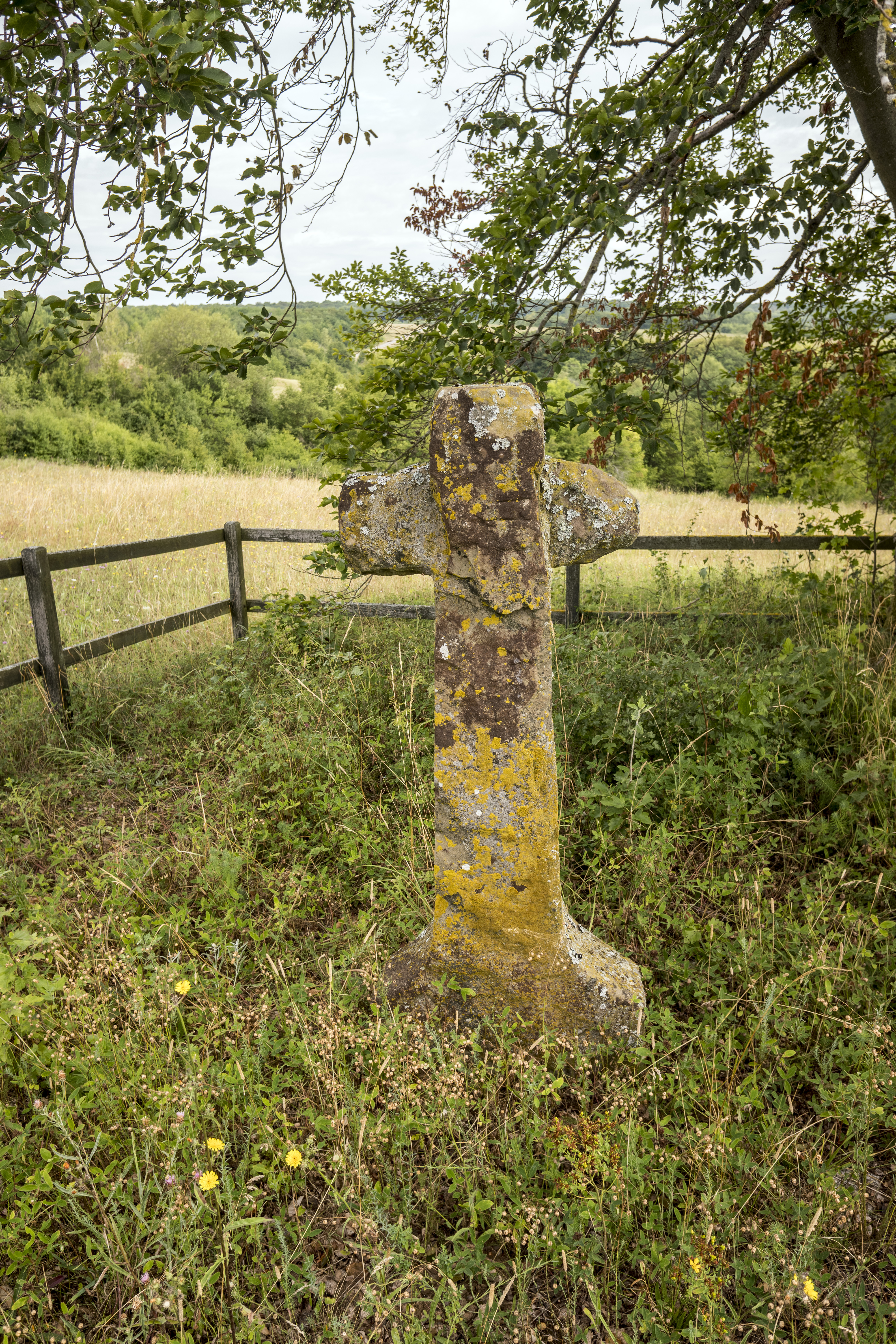 Sühnekreuz am BrönnhofThis is a photograph of an architectural monument.